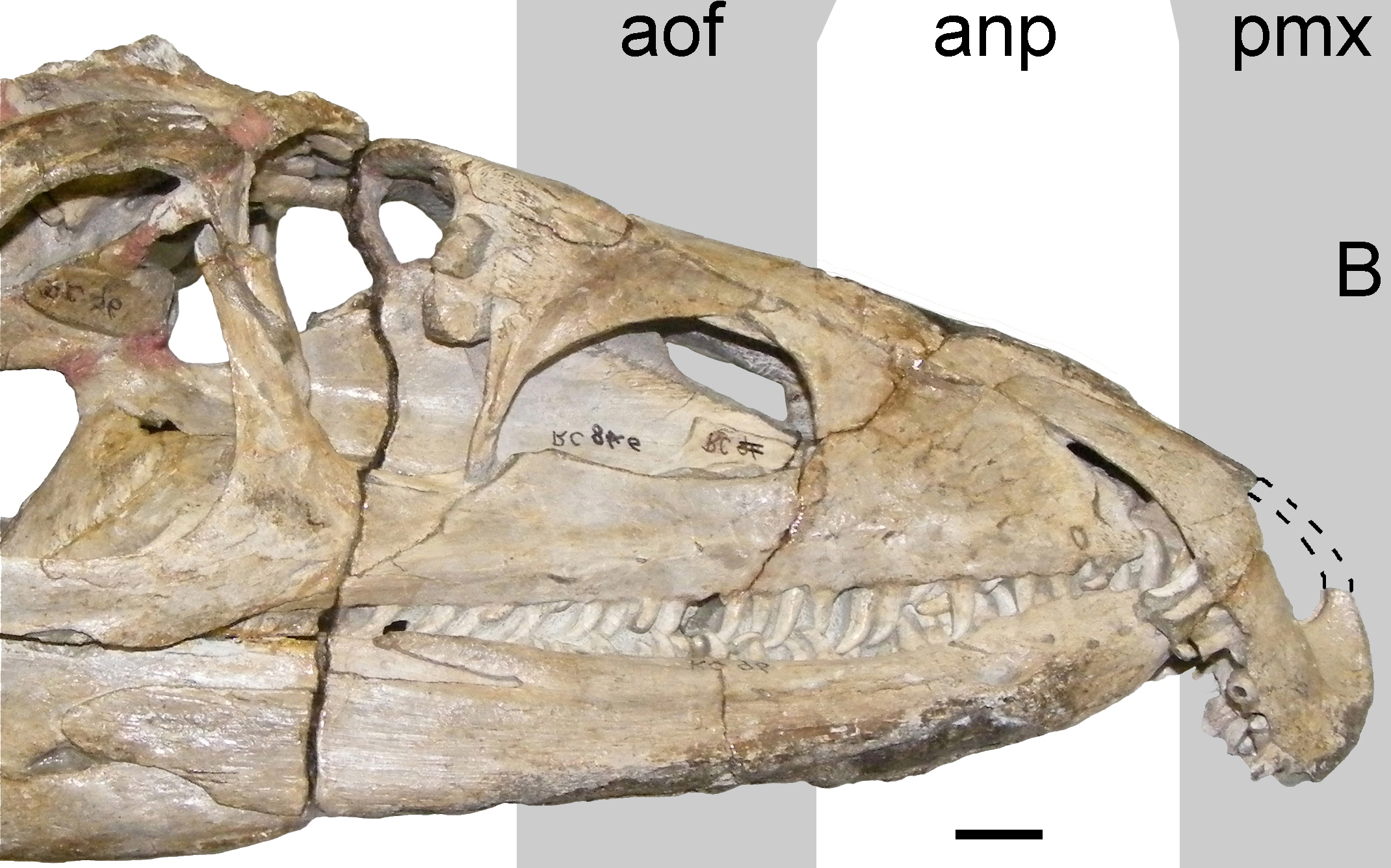 Proterosuchus fergusi (RC 96).